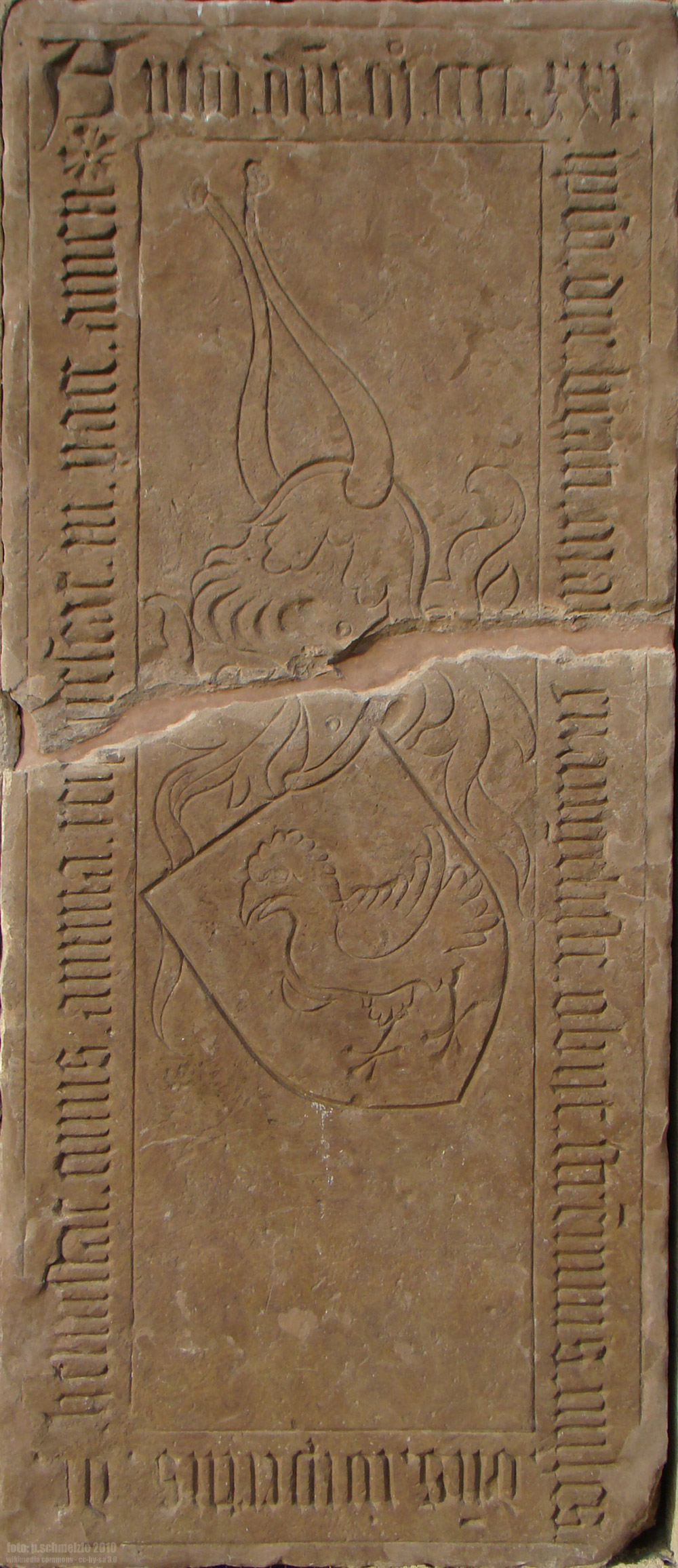 Grabmal des Weiprecht II. von Helmstatt an der Totenkirche in Neckarbischofsheim